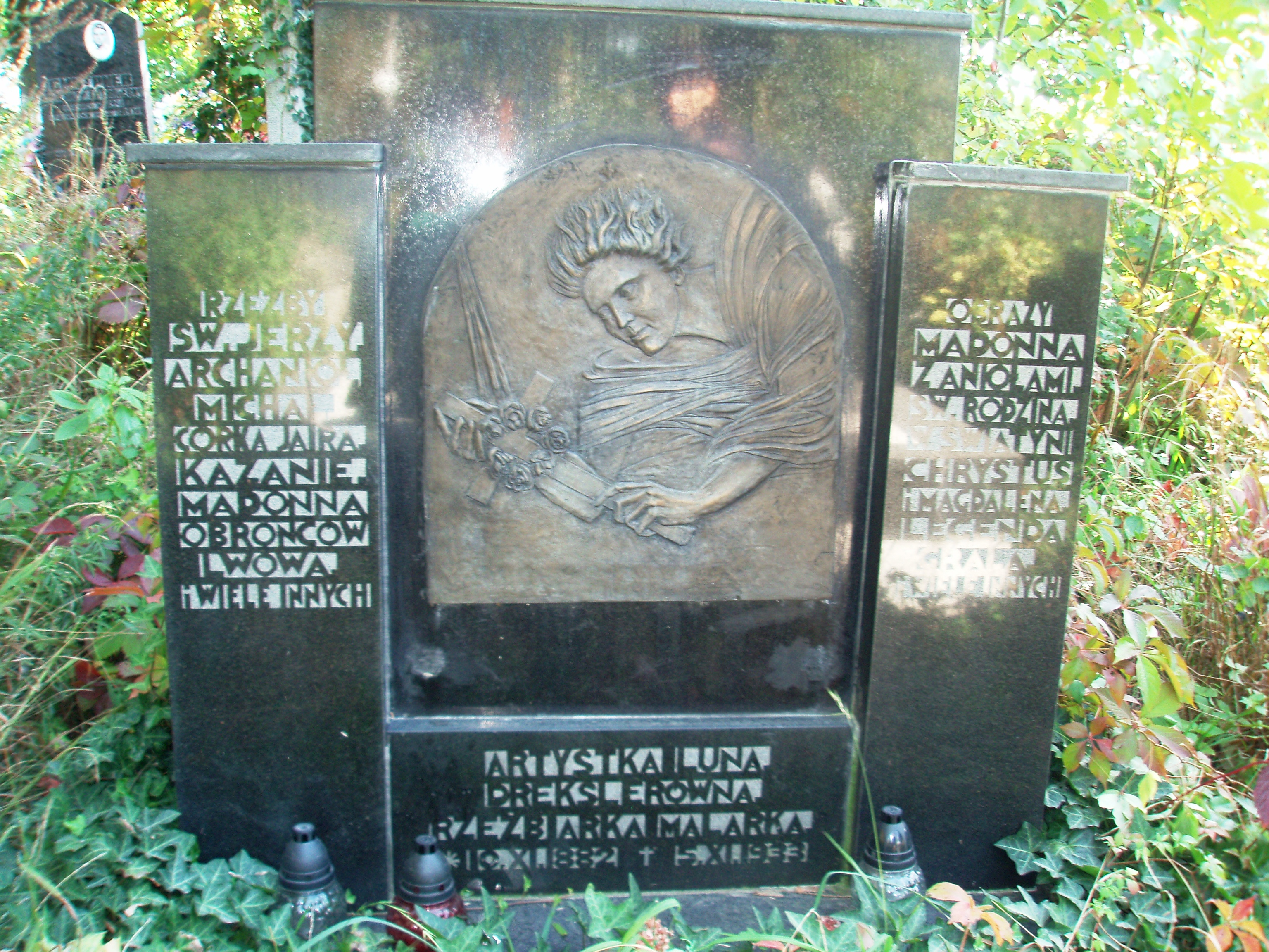 Львів, вул. Мечнікова, 33